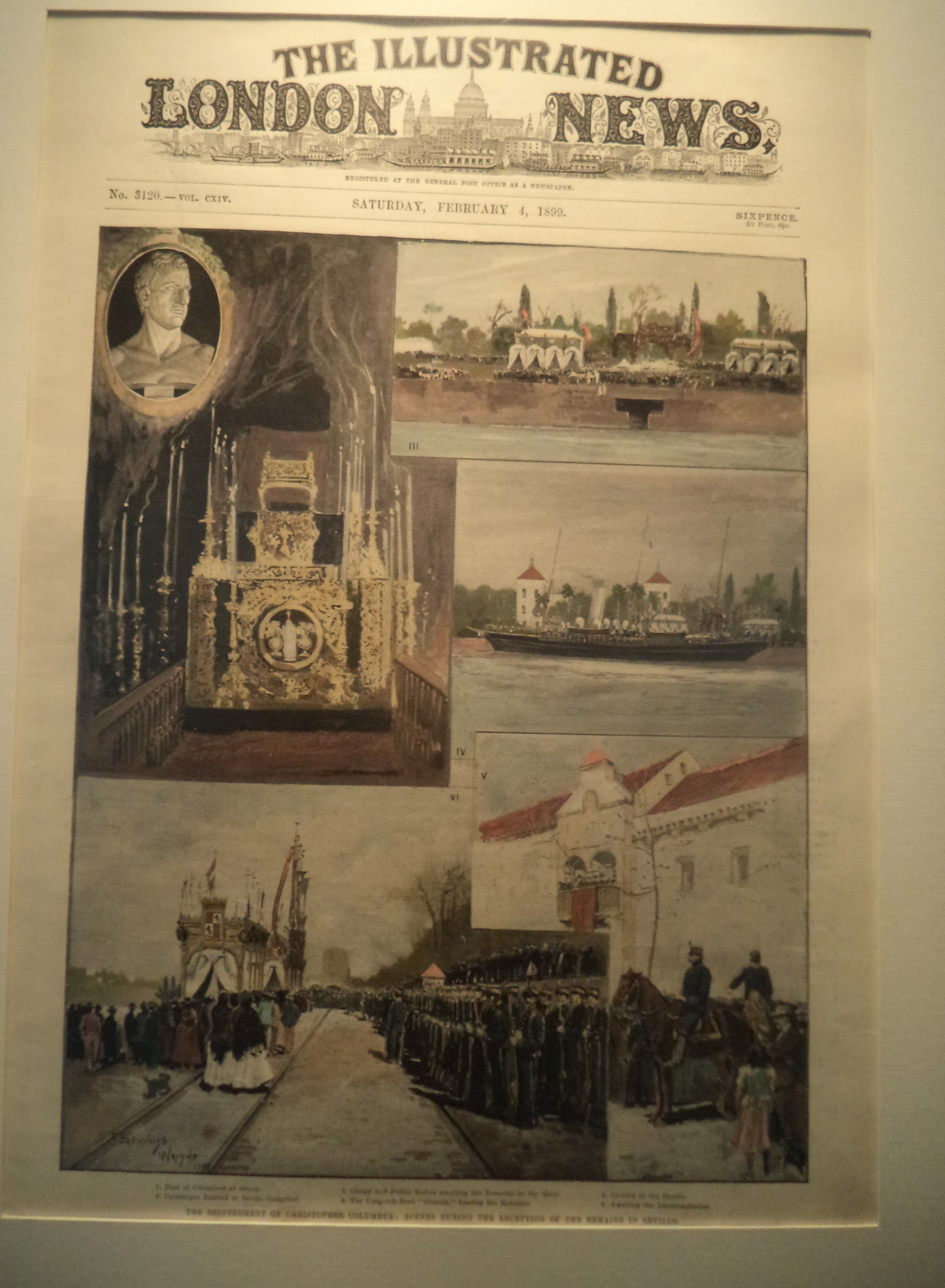 Escenas de la llegada a Sevilla de los restos de Cristóbal Colón.